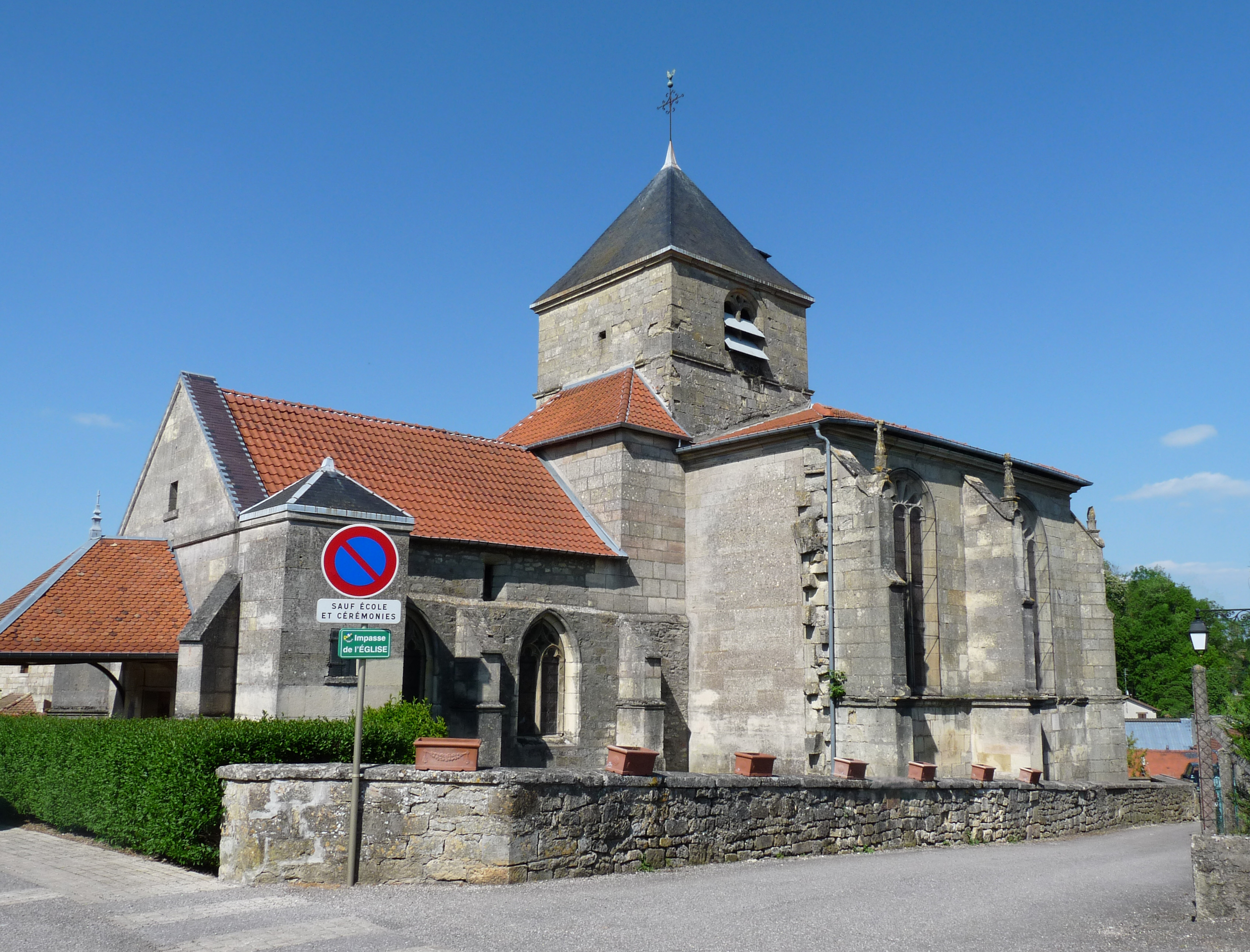 Eglise de Combles-en-Barrois (Meuse).